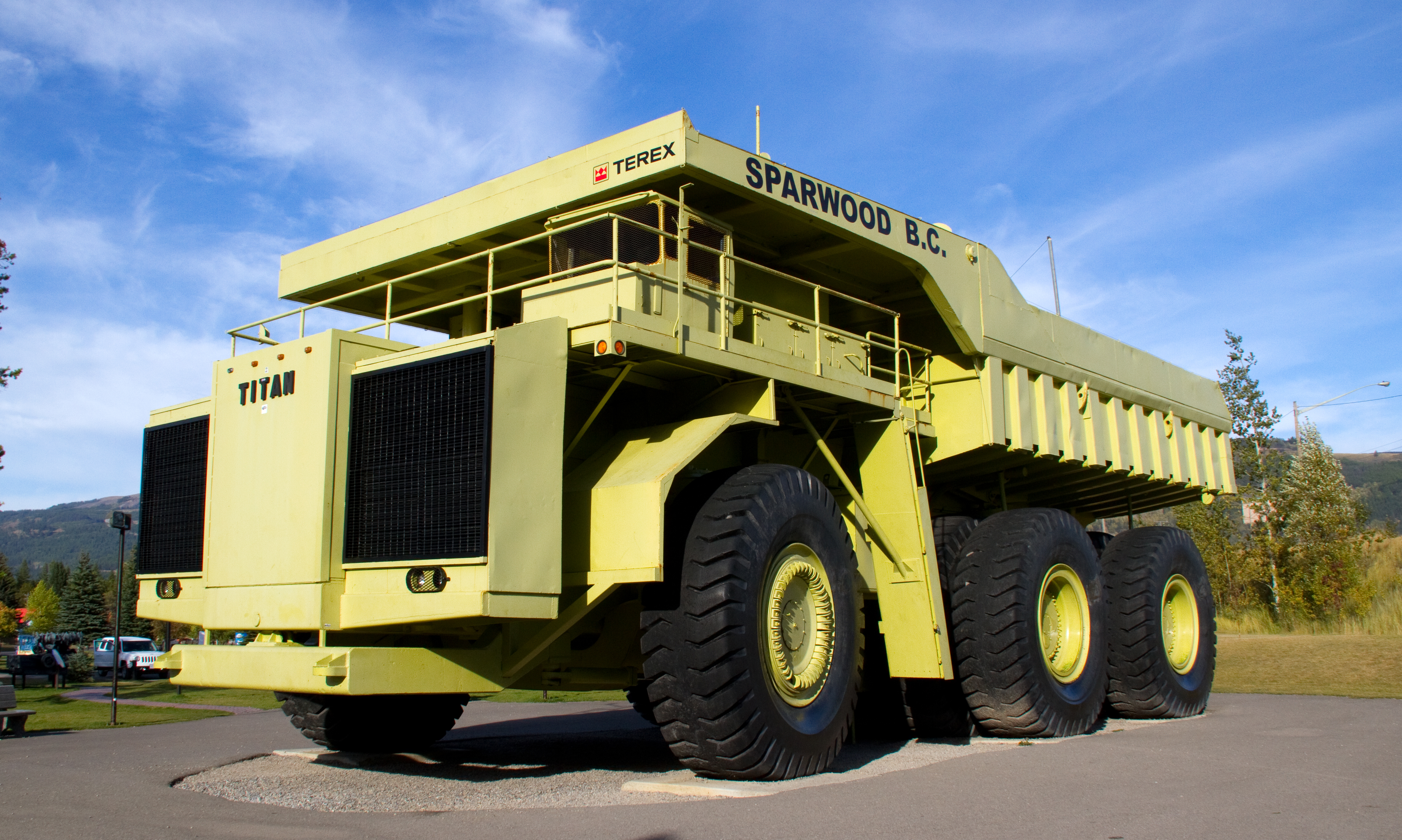 Titan